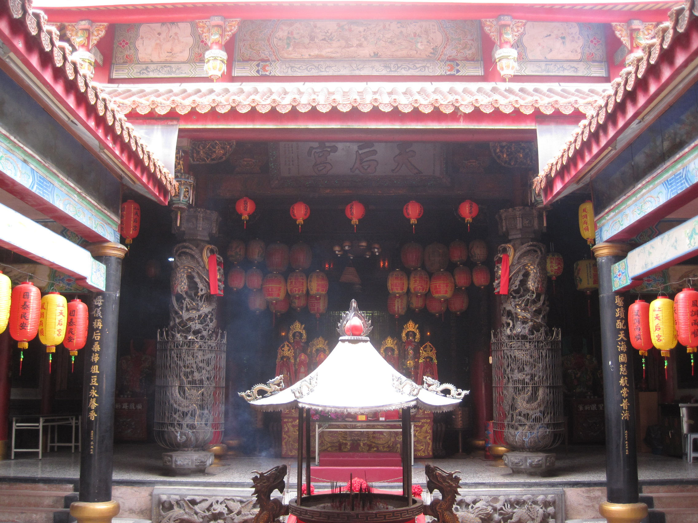 中文（台灣）: 山上天后宮天井